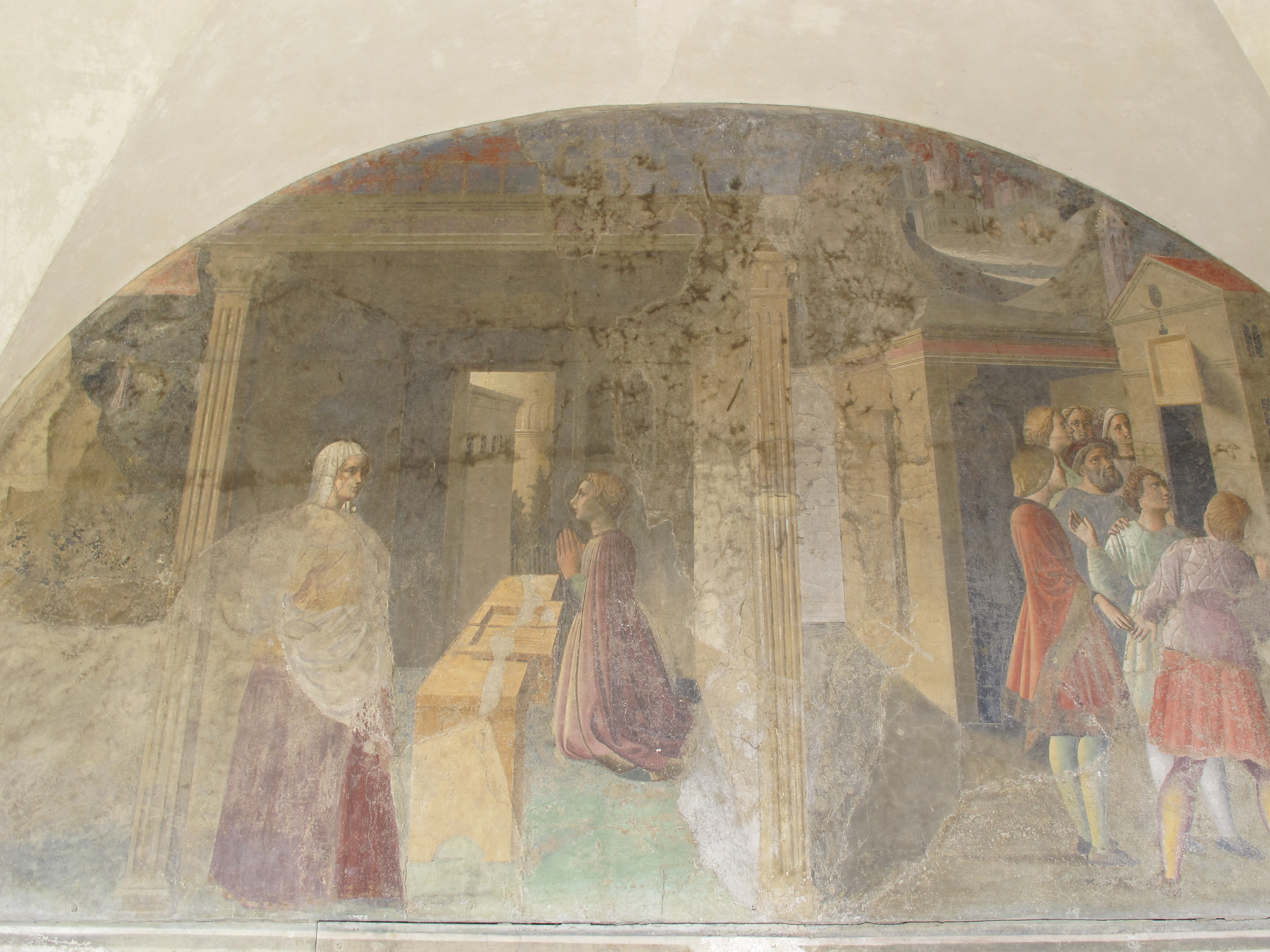 firenze 2011